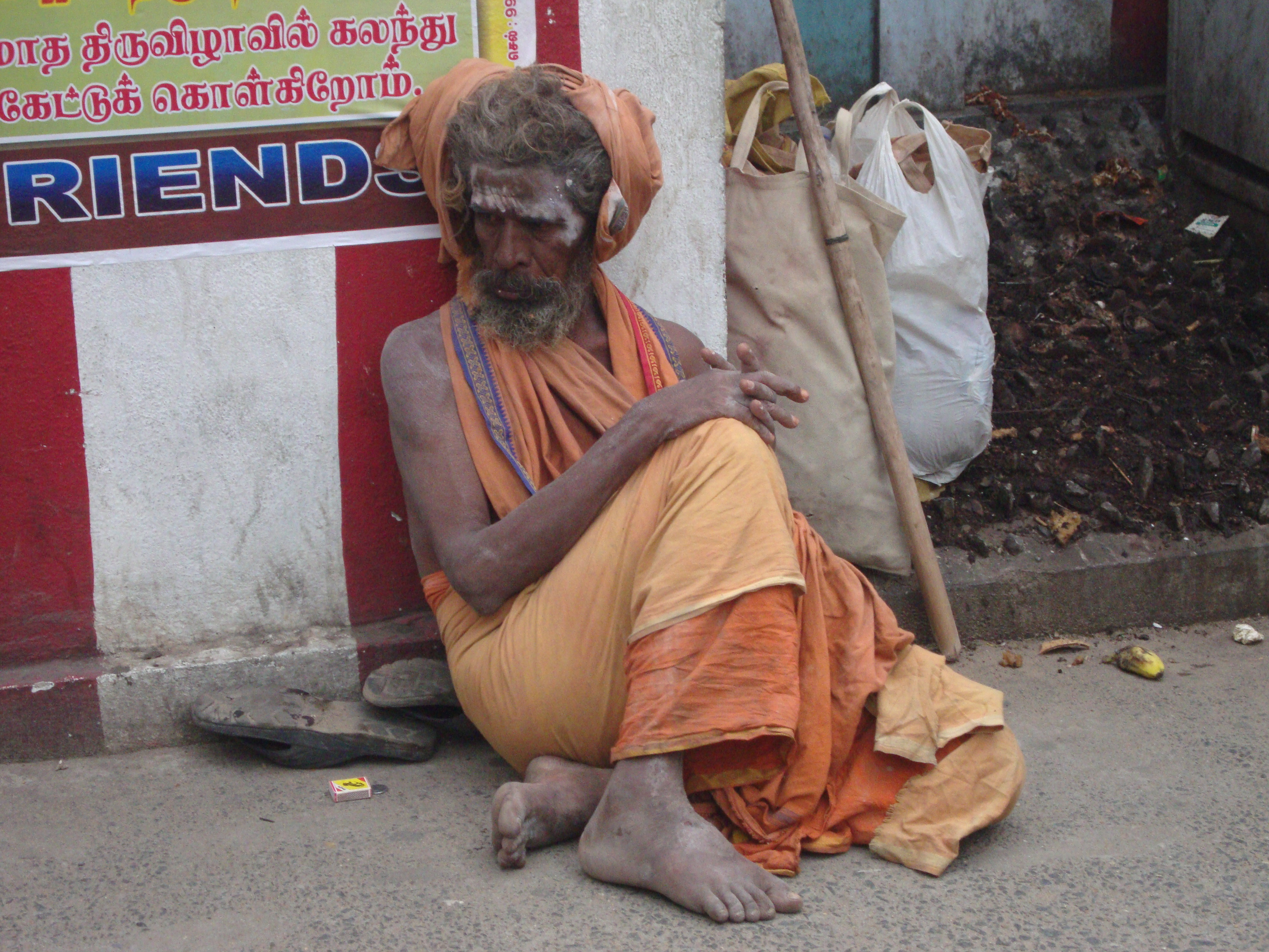 Saint at tamilnadu